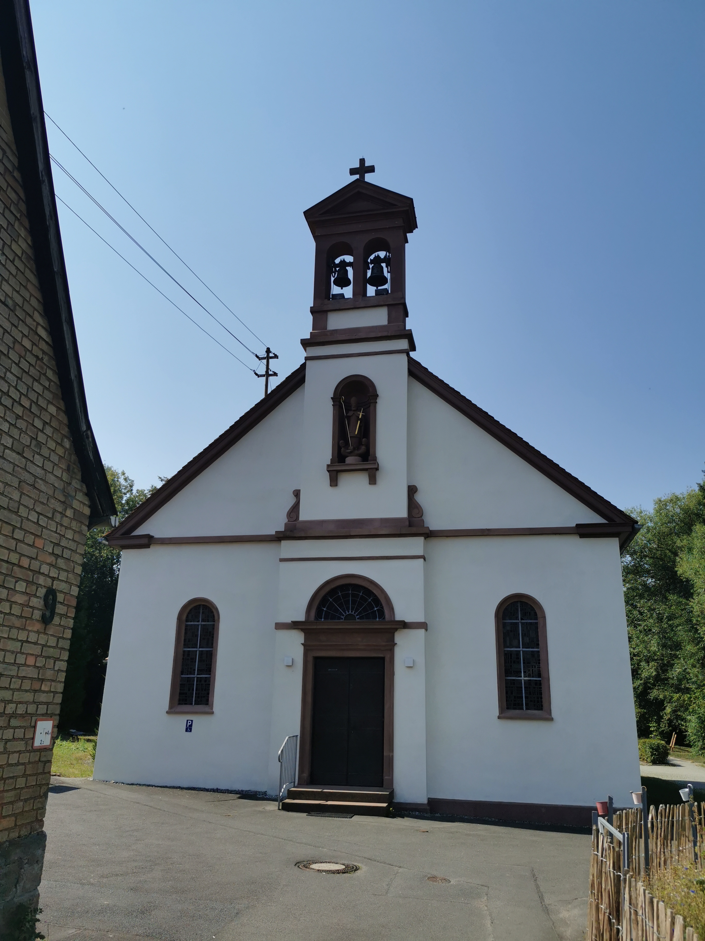 2020-08-09 St. Kilian (Schweigern)